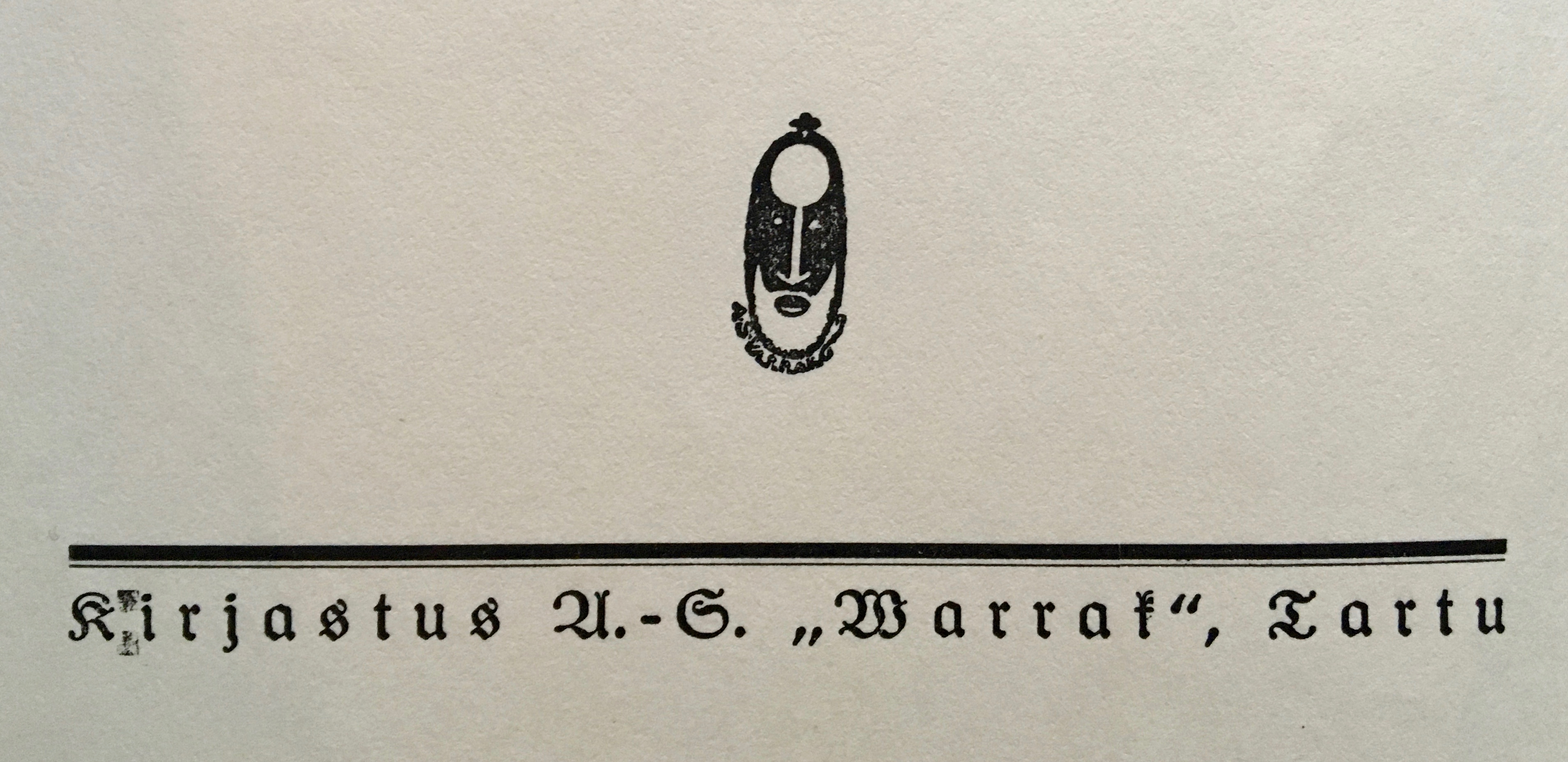 Warrak embleem